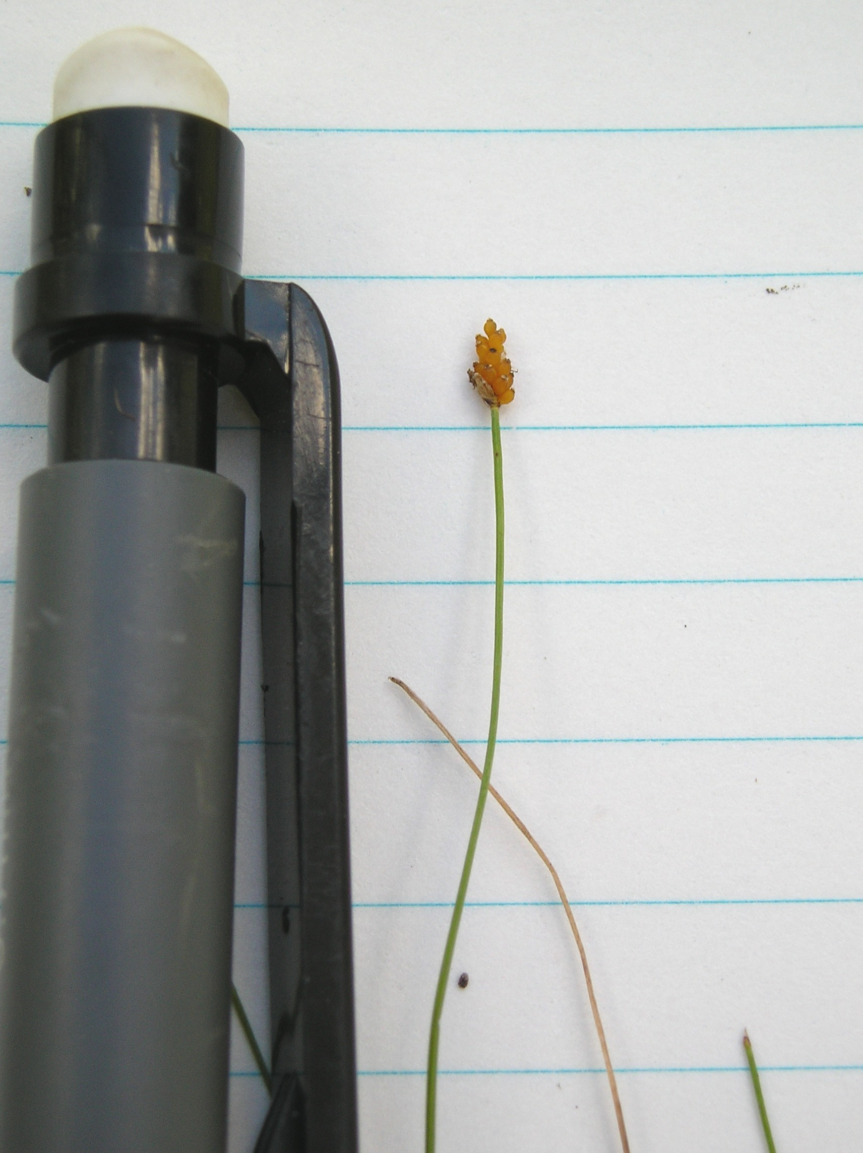 Eleocharis_nitida_2-eheep